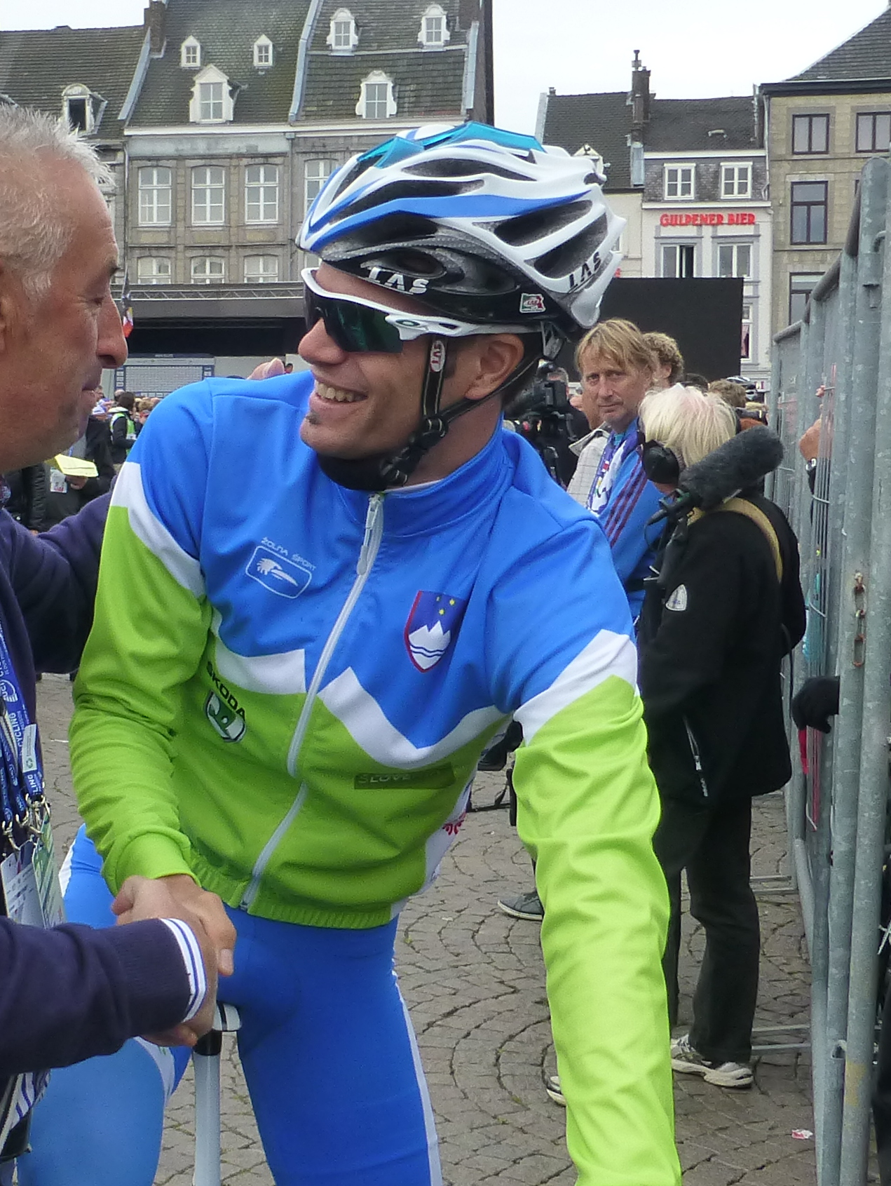 Luka Mezgec voor de start van het wereldkampioenschap Limburg 2012 te Maastricht.